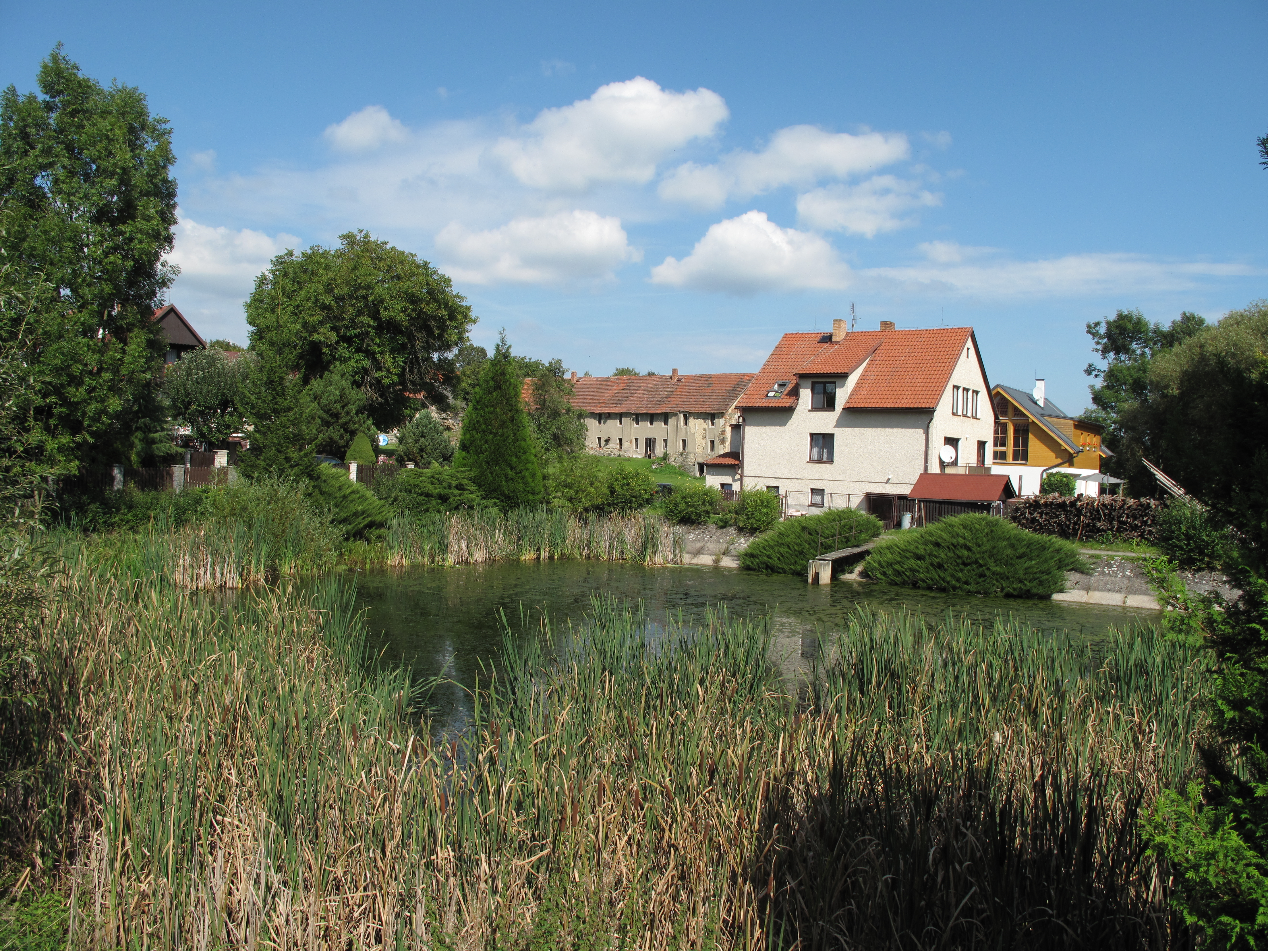 Rybník v Rabyni. Okres Benešov, Česká republika.